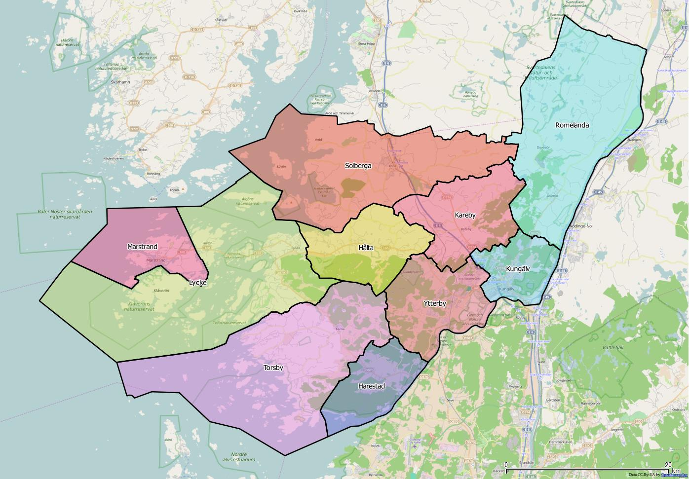 Distriktsindelningen i Kristinehamns kommun World file: 60.89704872245768996 0 0 -60.89704872245768996 1270825.60069170710630715 7975637.7510052602738142